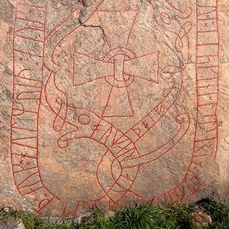 Sö109 detalj ned